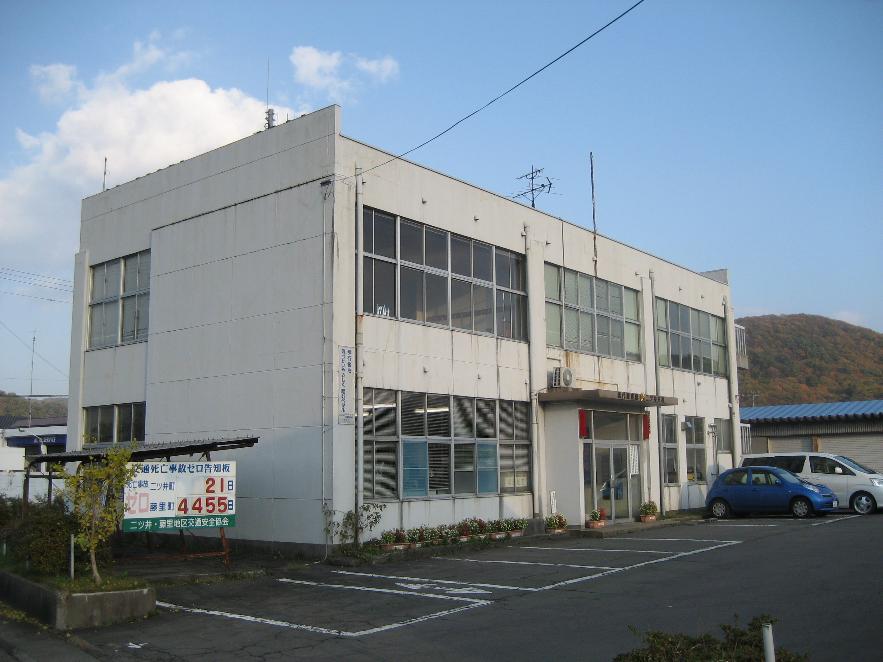 秋田県能代警察署二ツ井交番庁舎